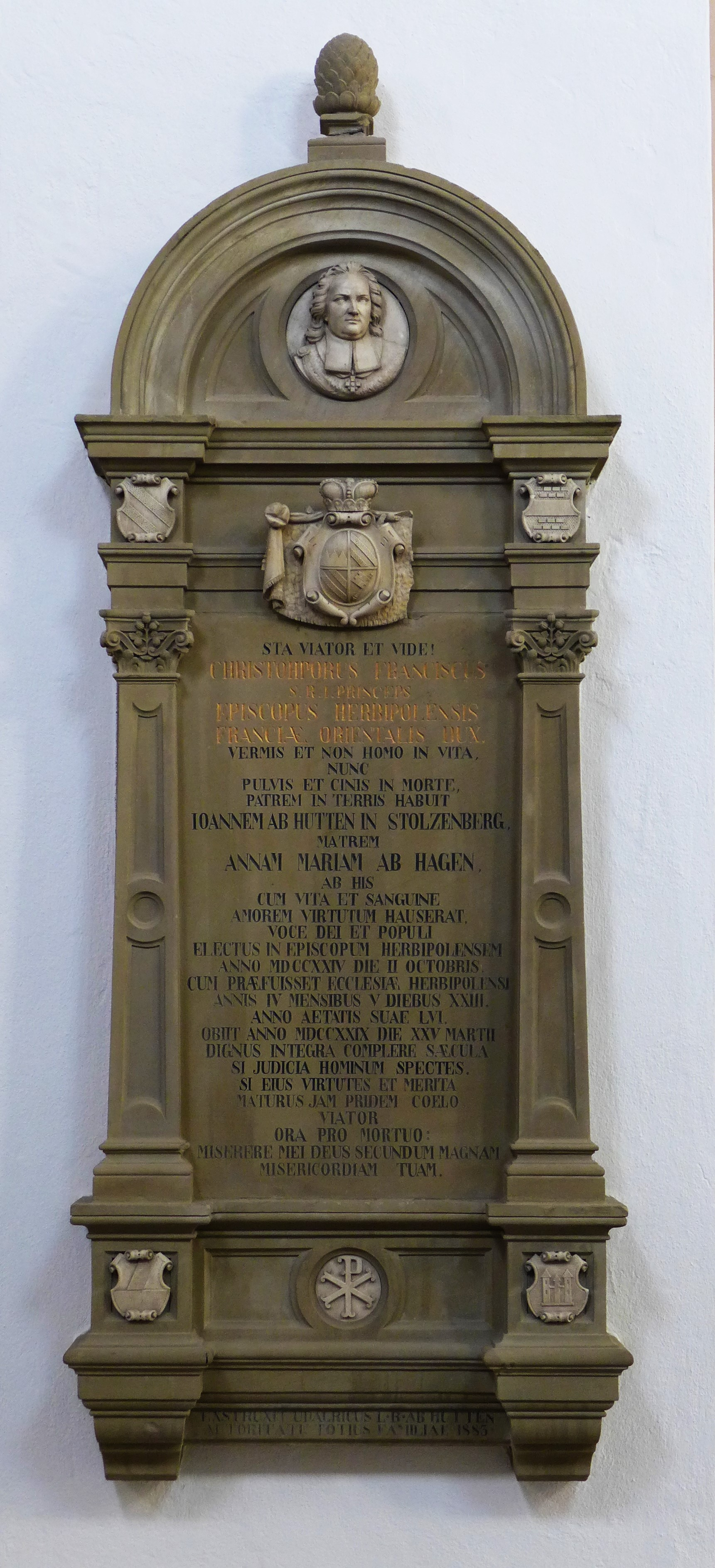 Gedenktafel im Würzburger Dom für den Würzburger Bischof Christoph Franz von Hutten, Sohn von Anna Maria von Hagen und Johann von Hutten zum Stolzenberg